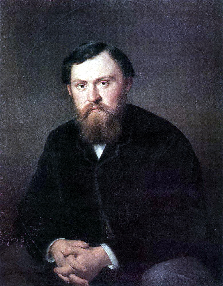 Портрет А.А. Борисовского